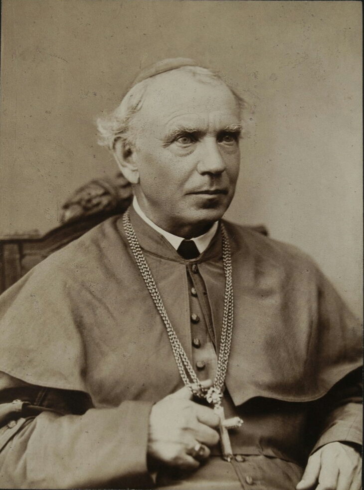 Zygmunt Szczęsny Feliński